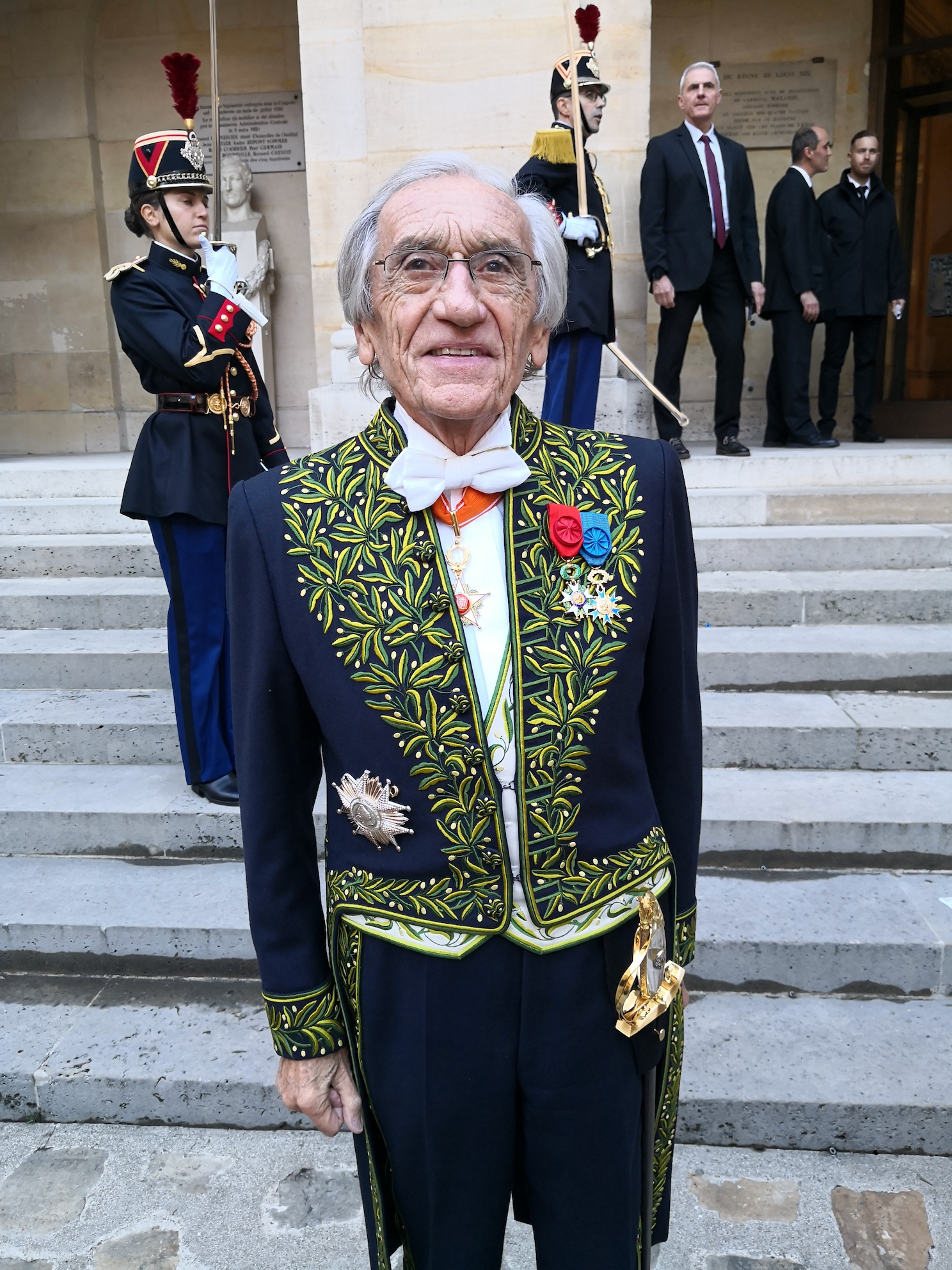 M. le Professeur Yves Pouliquen, en octobre 2019, à l'Académie française, en habit d'académicien.